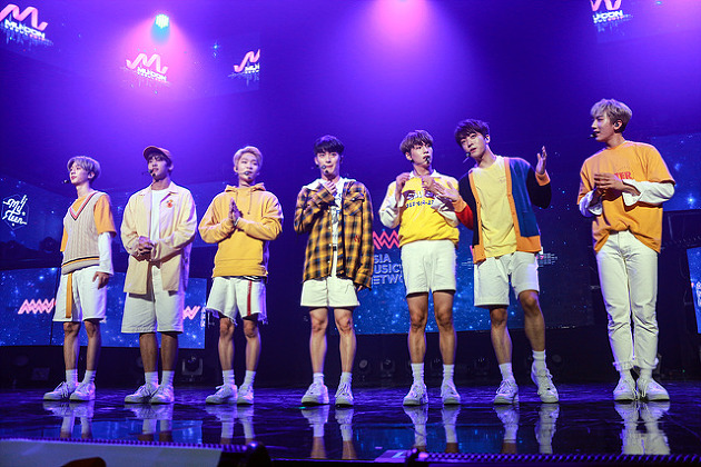 09월 26일 뮤콘 쇼케이스 MUCON Showcase 마이틴(MYTEEN)